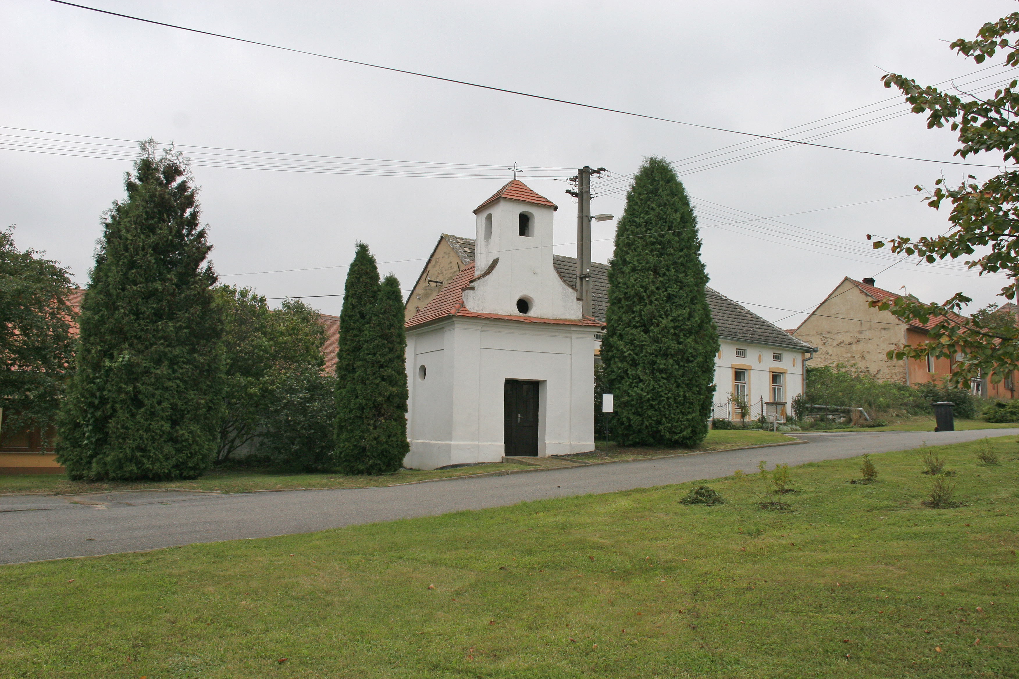 Kaple na návsi v Jiřicích u Moravských Budějovic